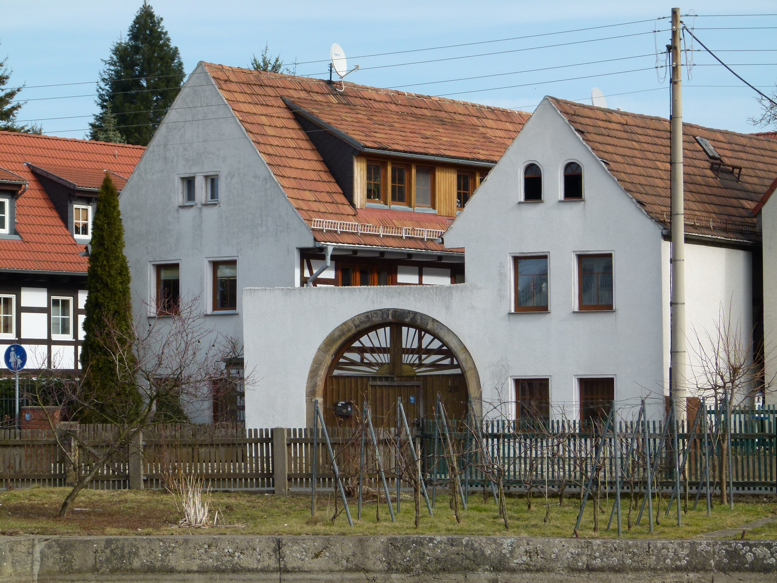 Denkmalgeschützter Dreiseithof, Altnaundorf 29, Radebeul